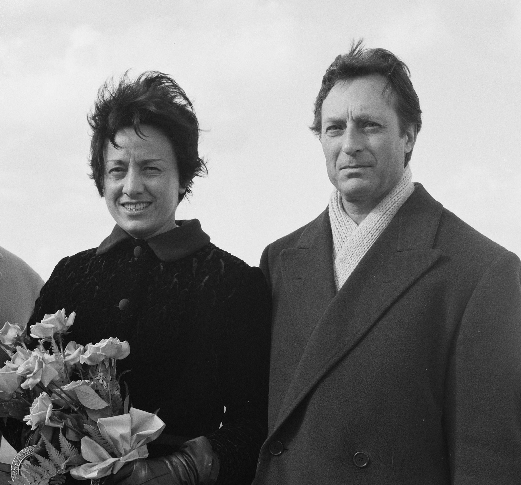 Aankomst van Carlo Maria Giulini, gastdirigent van het Philharmonia Orchestra in Londen, en zijn echtgenote op Schiphol in verband met de uitreiking van de Edisons